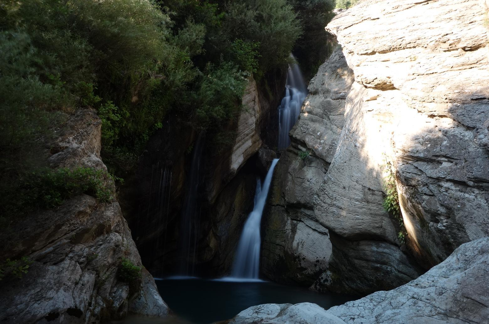 Bogova Waterfall